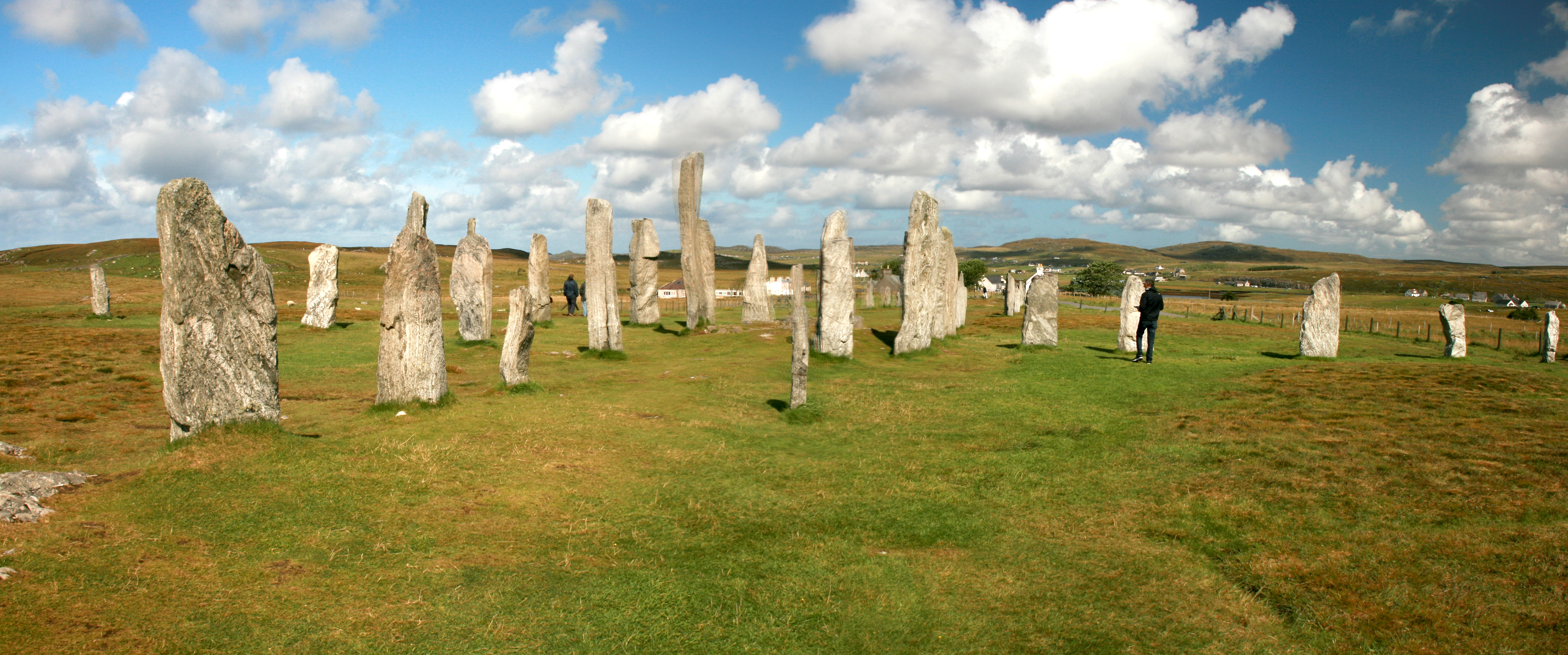 Piedras de Callanish en el verano de 2011. Erigidas en el Neolítico, están consideradas uno de los crómlech más importantes de Escocia. Se encuentran en las Hébridas Exteriores.